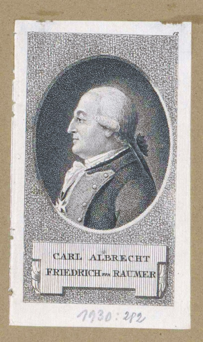 Scan aus dem Bildarchiv Austria